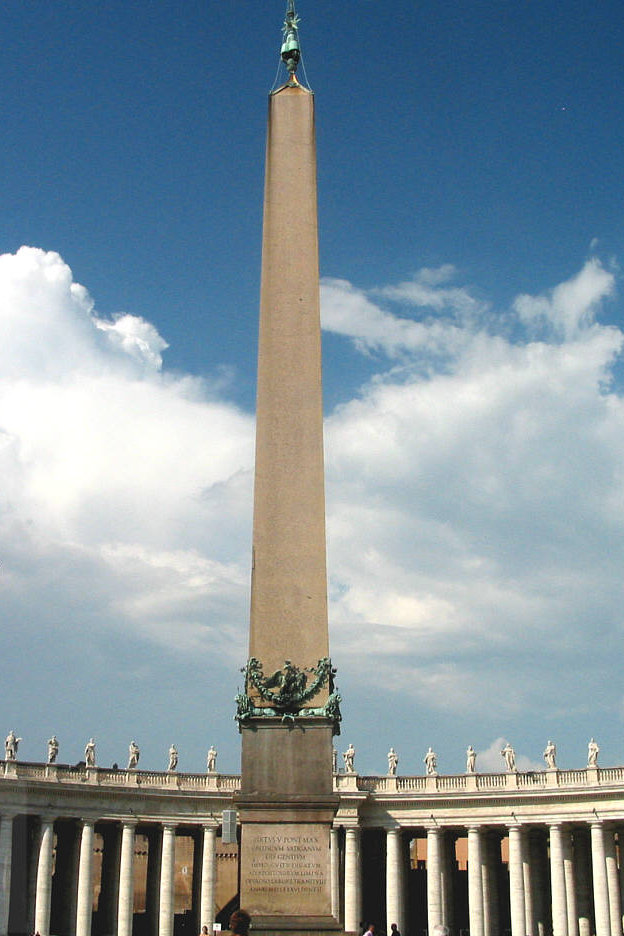 Vatican Piazza San Pietro Obelisk